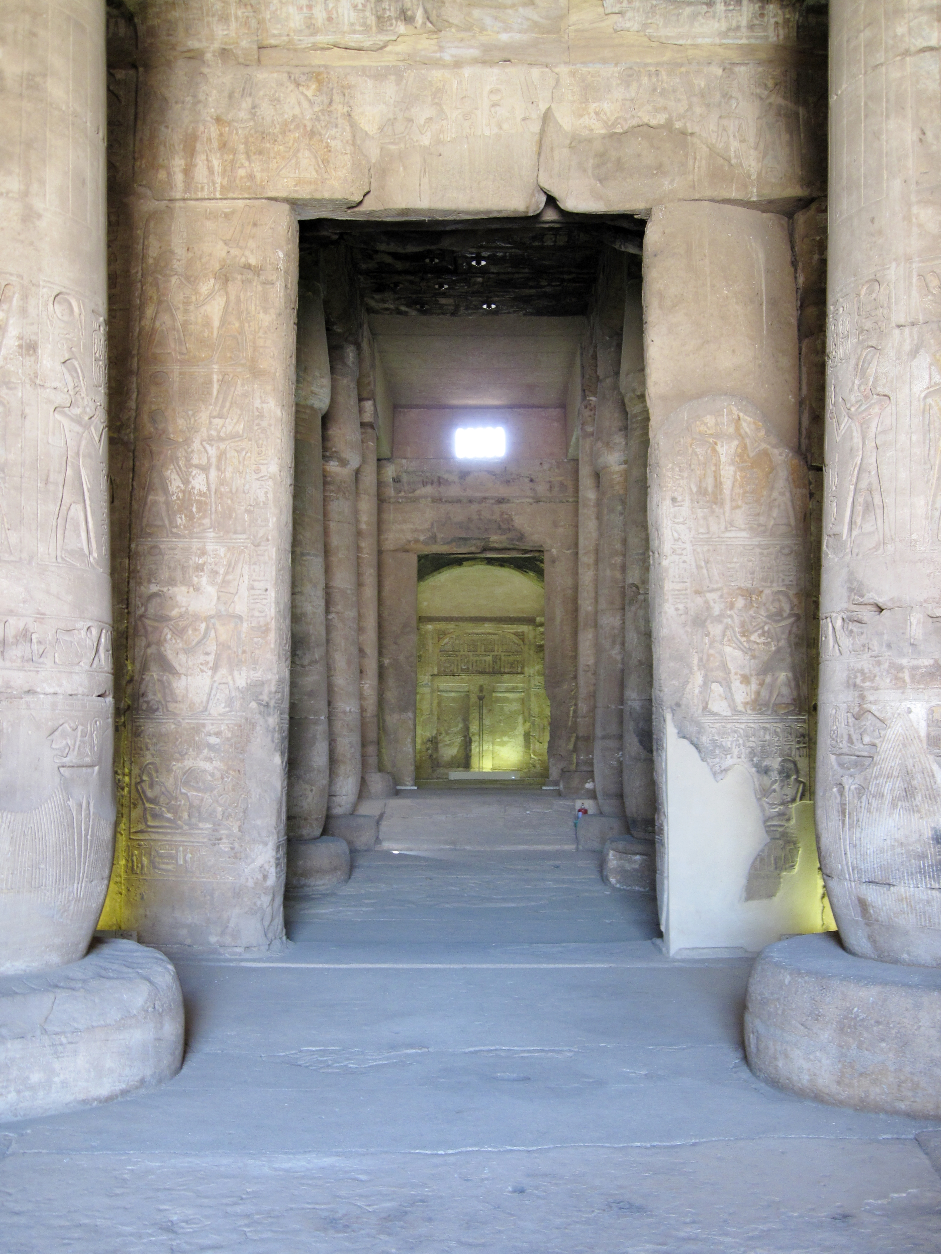 Blick vom Eingang des Totentempels Sethos I. in Abydos auf das Heiligtum des Amun-Re, Ägypten